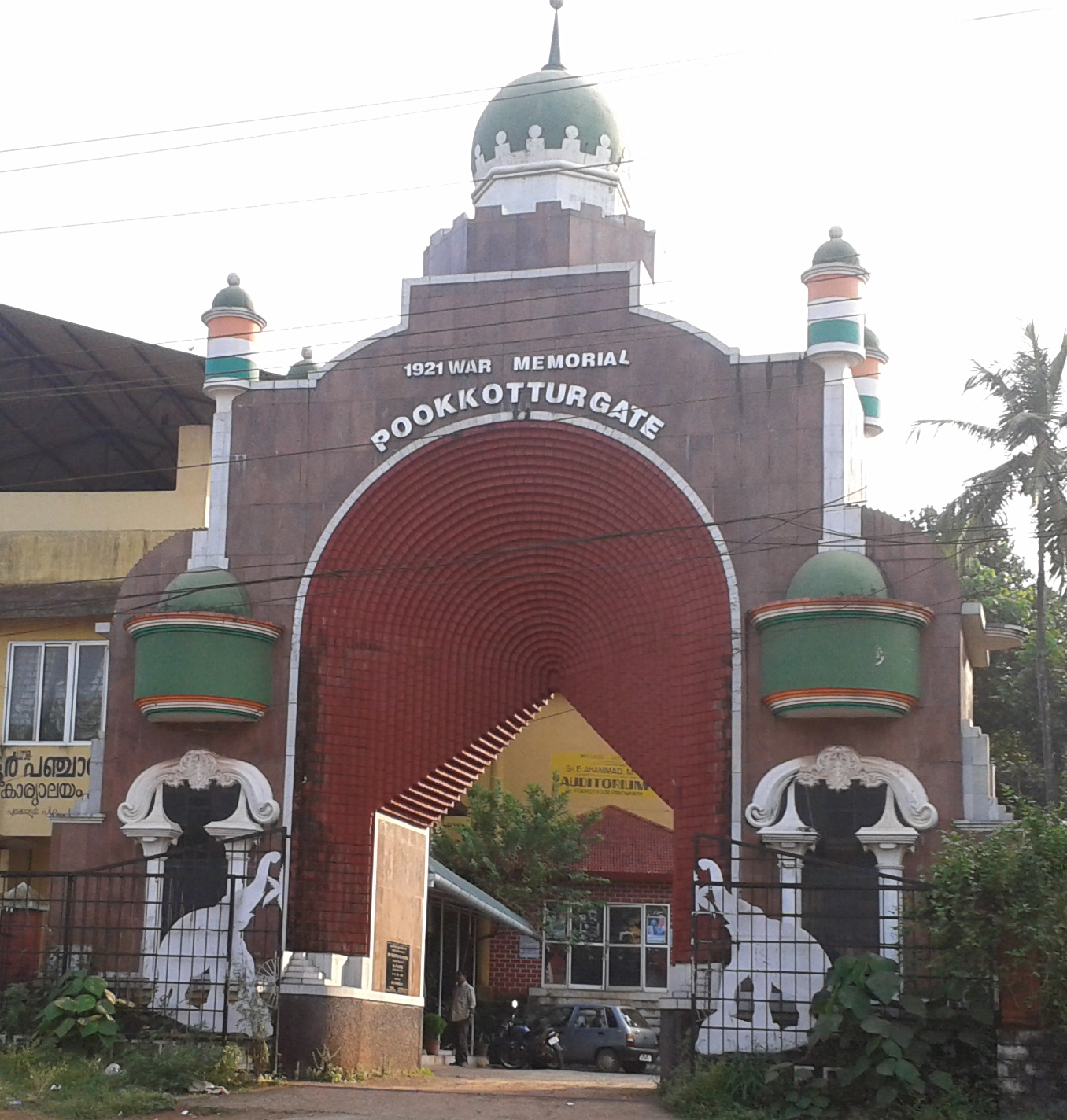 1921 ൽ പൂക്കോട്ടൂരിൽ വെച്ച് ബ്രിട്ടീഷുകാരുമായി നടന്ന യുദ്ധത്തിൽ രക്തസാക്ഷികളായ യോദ്ധാക്കളുടെ സ്മരണക്കായി പണി കഴിപ്പിച്ച സ്മാരക കവാടം.മലപ്പുറം ബ്ലോക്ക് പഞ്ചായത്ത് ഫണ്ട് ഉപയോഗിച്ച് 2002 ൽ നിർമാണം തുടങ്ങി 2004 ൽ തുറന്ന് കൊടുത്തു. പൂക്കോട്ടൂർ ഗ്രാമപഞ്ചായത്ത് ഓഫീസ് ഉൾപ്പെടുന്ന കെട്ടിട സമുച്ചയത്തിലേക്കാണ് ഈ കവാടത്തിലൂടെ പ്രവേശിക്കുന്നത്. നാഷനൽ ഹൈവേ 213 ൽ അറവങ്കരയിലാണ് ഇത് സ്ഥിതി ചെയ്യുന്നത്.